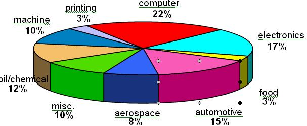 schéma electroless nickel